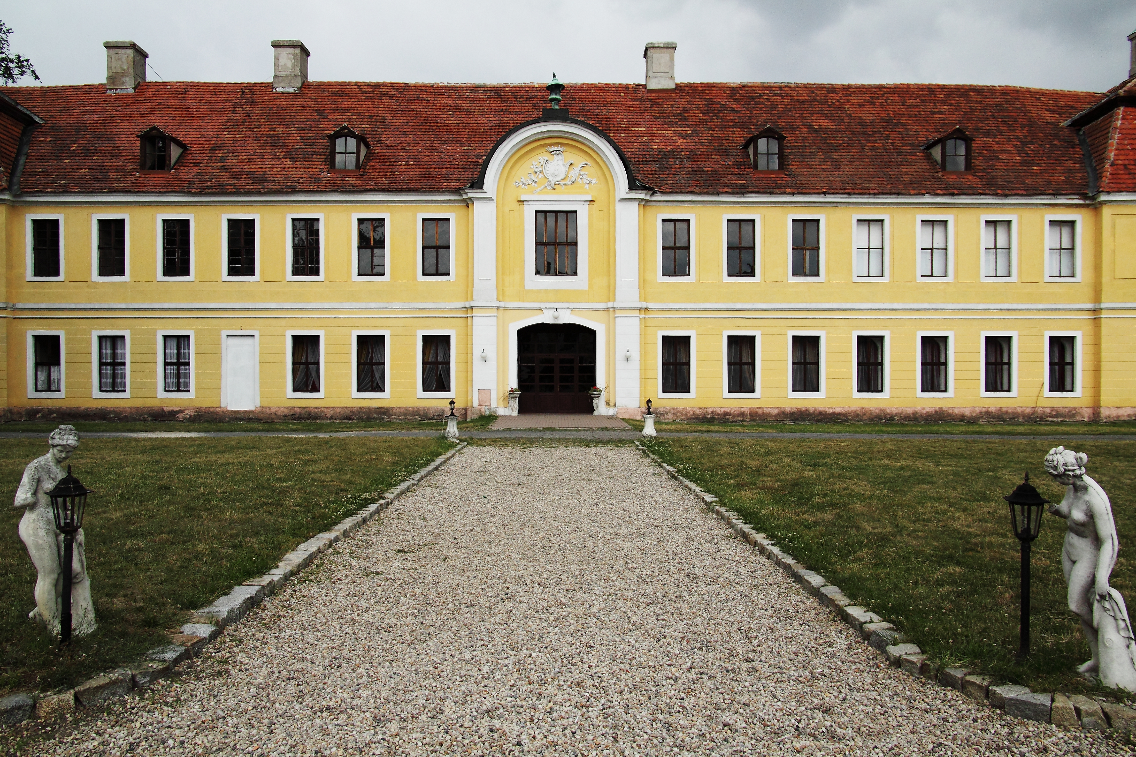 Brody, oficyna II, XVIII, XX